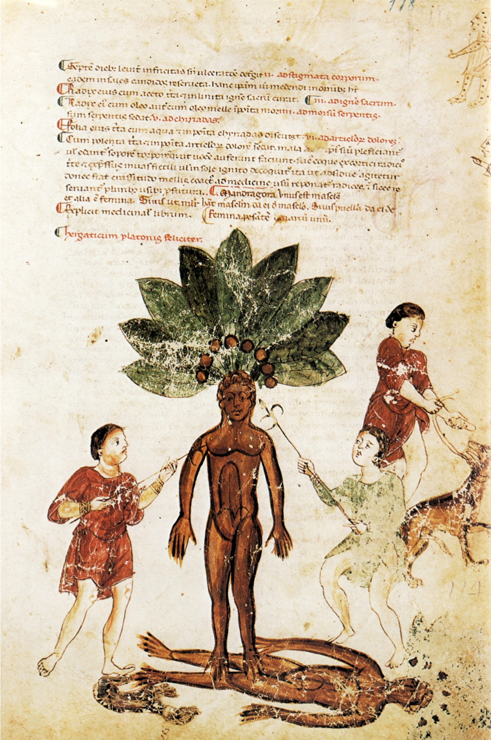 Seite aus dem Kodex Medicina antiqua (fol. 118 recto). Das Bild zeigt die mythische Ernte einer Alraunwurzel. Der Text darüber erläutert die medizinische Anwendung der Pflanze Mandragora (gegen Ausschlag und Gelenkschmerzen).